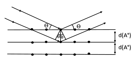 Représentation schématique de la loi de Bragg